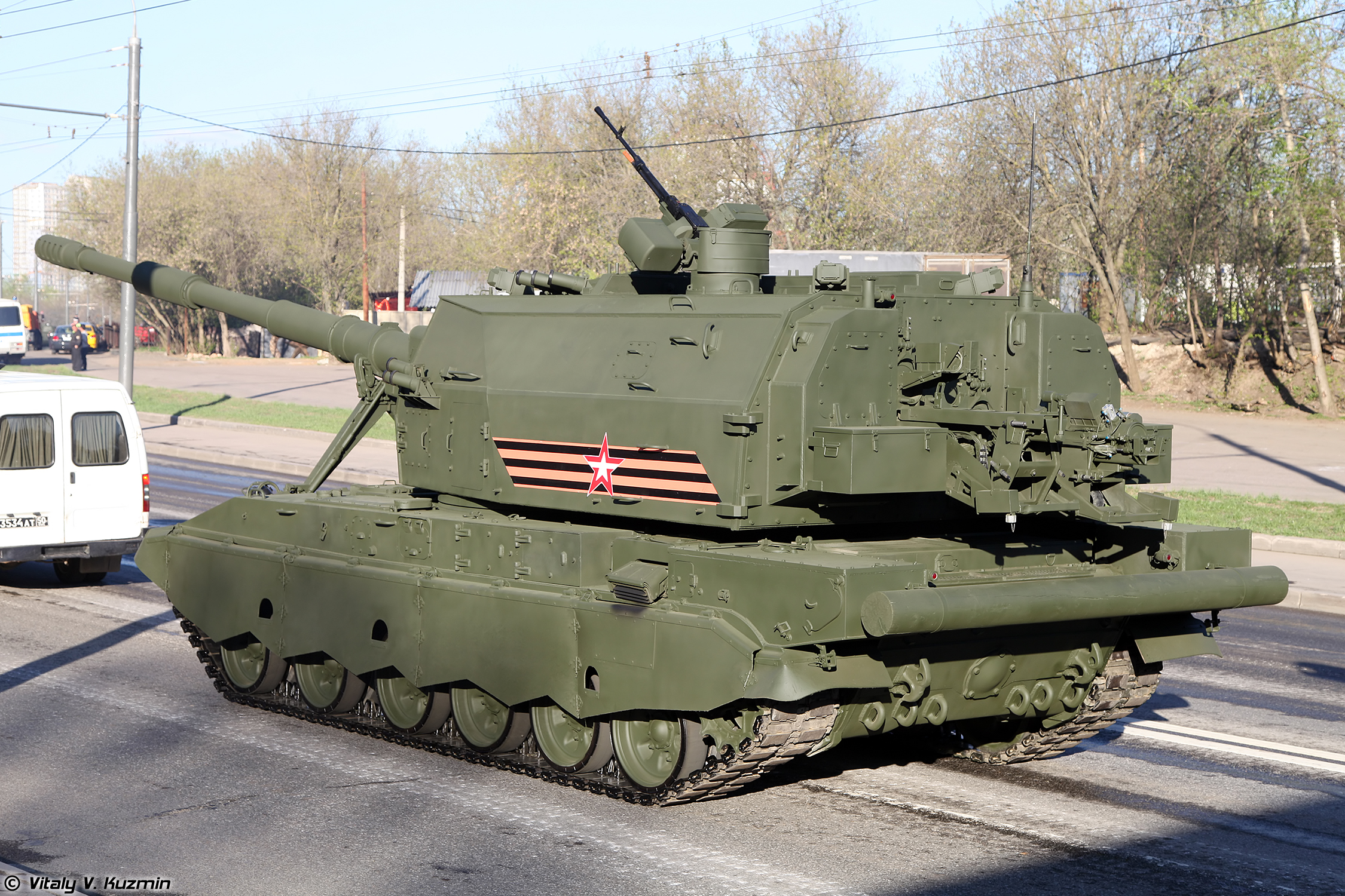 САУ 2С35 Коалиция-СВ (Self-propelled gun 2S35 Koalitsiya-SV)